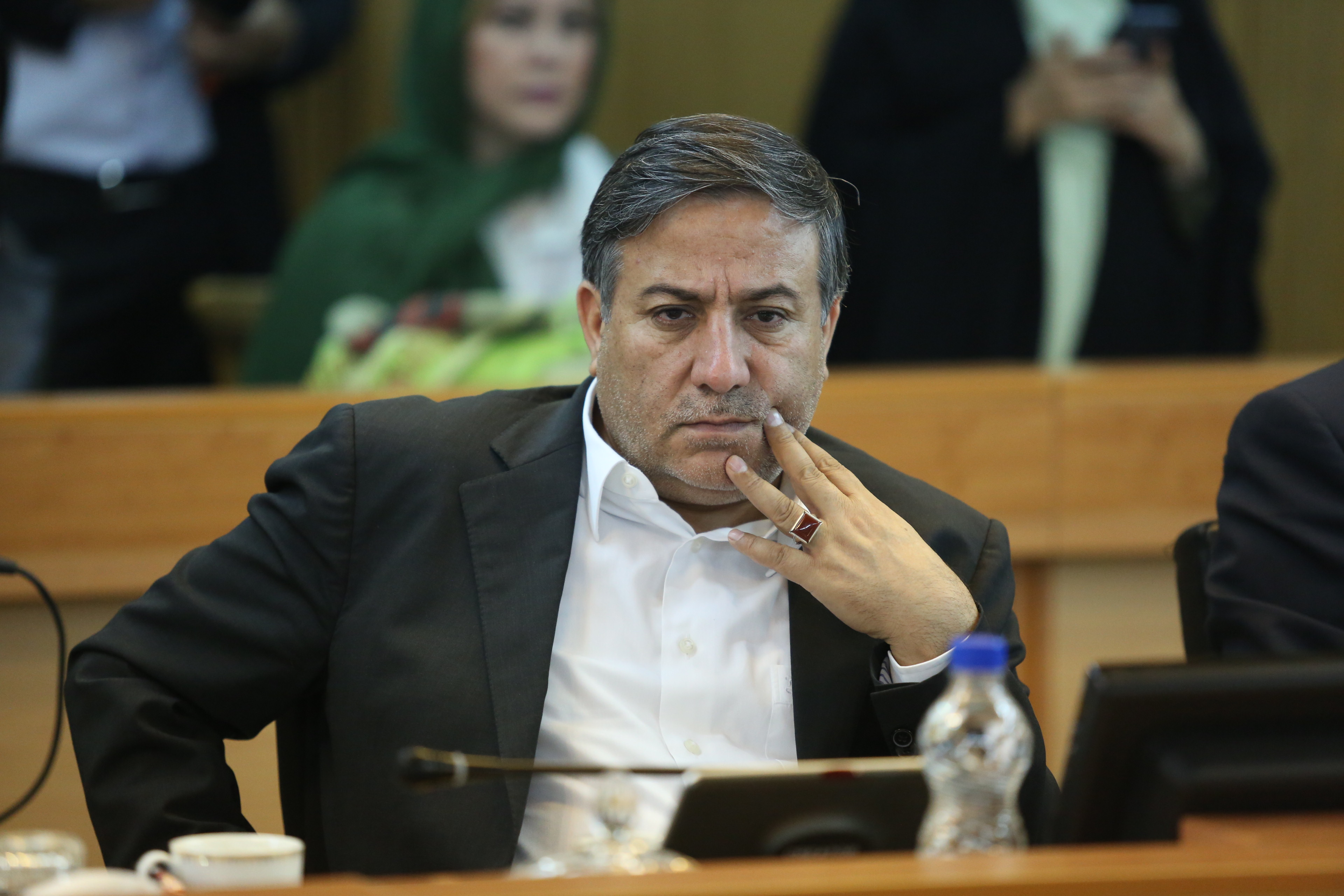 محمد سالاری (زاده ۲۰ آبان ۱۳۴۷ در روستای نشیب از توابع شهرستان سبزوار)، عضو شورای شهر تهران و رییس کمیسیون شهرسازی و معماری شورای شهر (دوره چهارم و پنجم)، نایب رئیس فراکسیون اصلاح طلبان شورای شهر تهران در دوره چهارم،قائم مقام حزب همبستگی ایران اسلامی، عضو شورای هماهنگی جبهه اصلاحات، مدیر مسئول روزنامه سراسری همبستگی. [۱] وی در چهارمین دوره انتخابات شورای شهر تهران (دوره قبلی ۱۳۹۲ تا ۱۳۹۶) در فهرست اصلاح طلبان قرار داشت و به شورای شهر تهران راه یافت، او همچنین در پنجمین دوره انتخابات شورای اسلامی شهر تهران با کسب 1/188/874 رای به عنوان نماینده مردم در شورای شهر انتخاب شد.